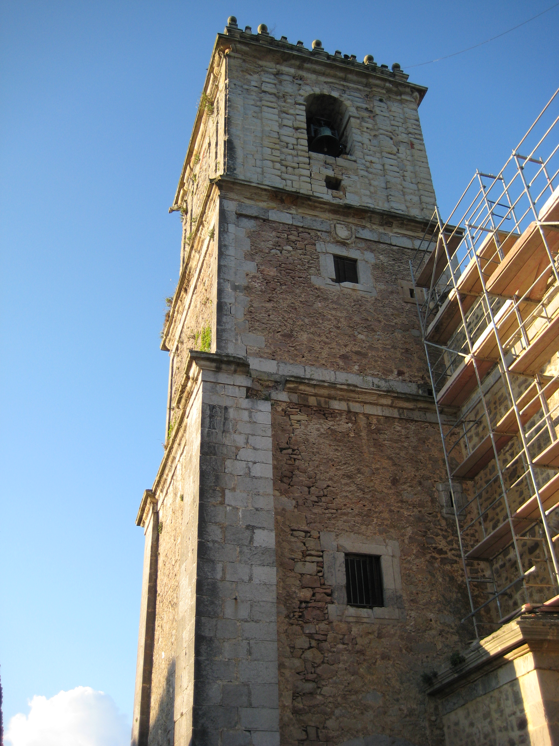 Torre campanario de la iglesia de San Julián y Santa Basilisa de Isla (Arnuero, Cantabria. España)